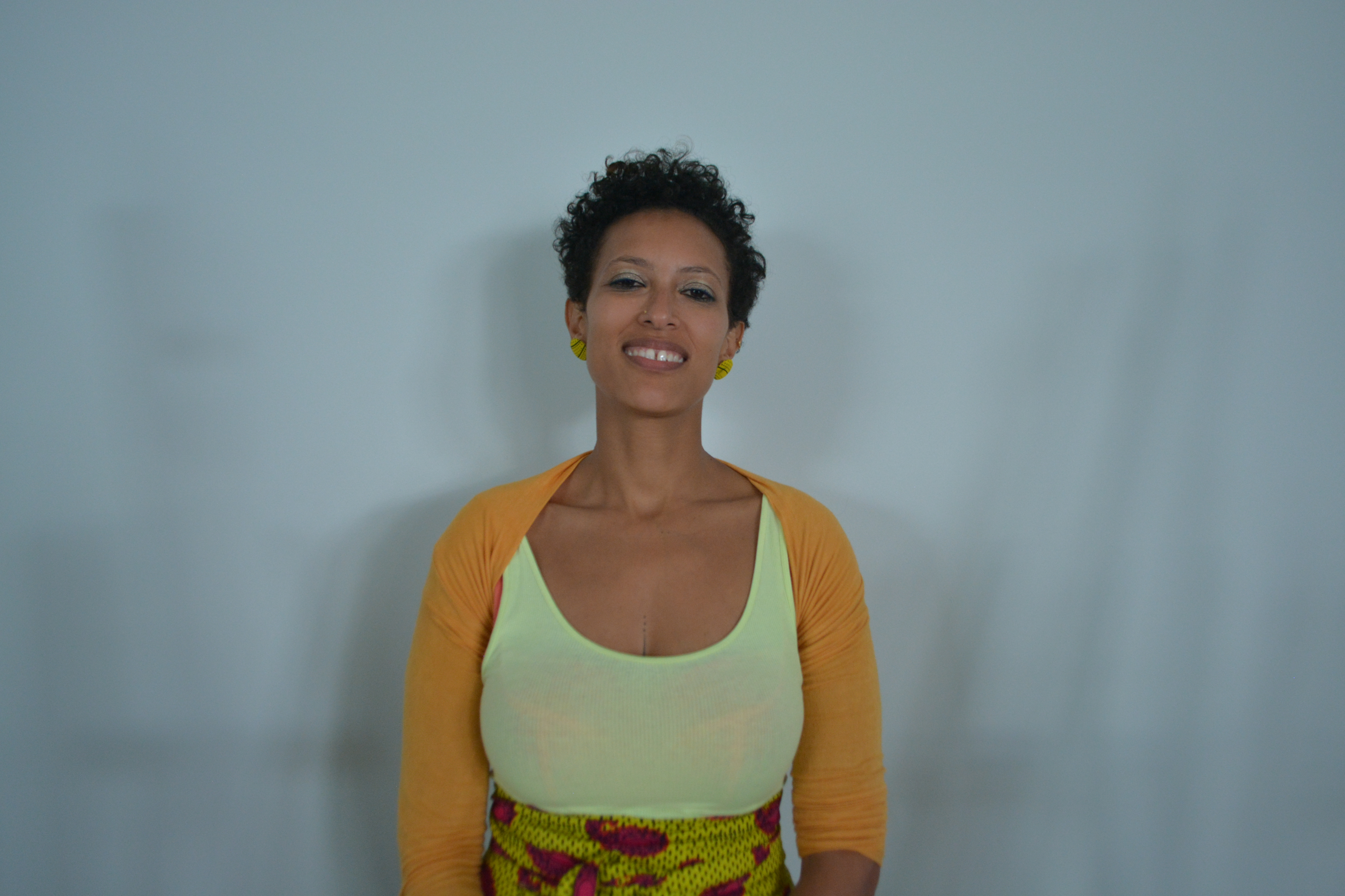 Feminista en AWID 2016